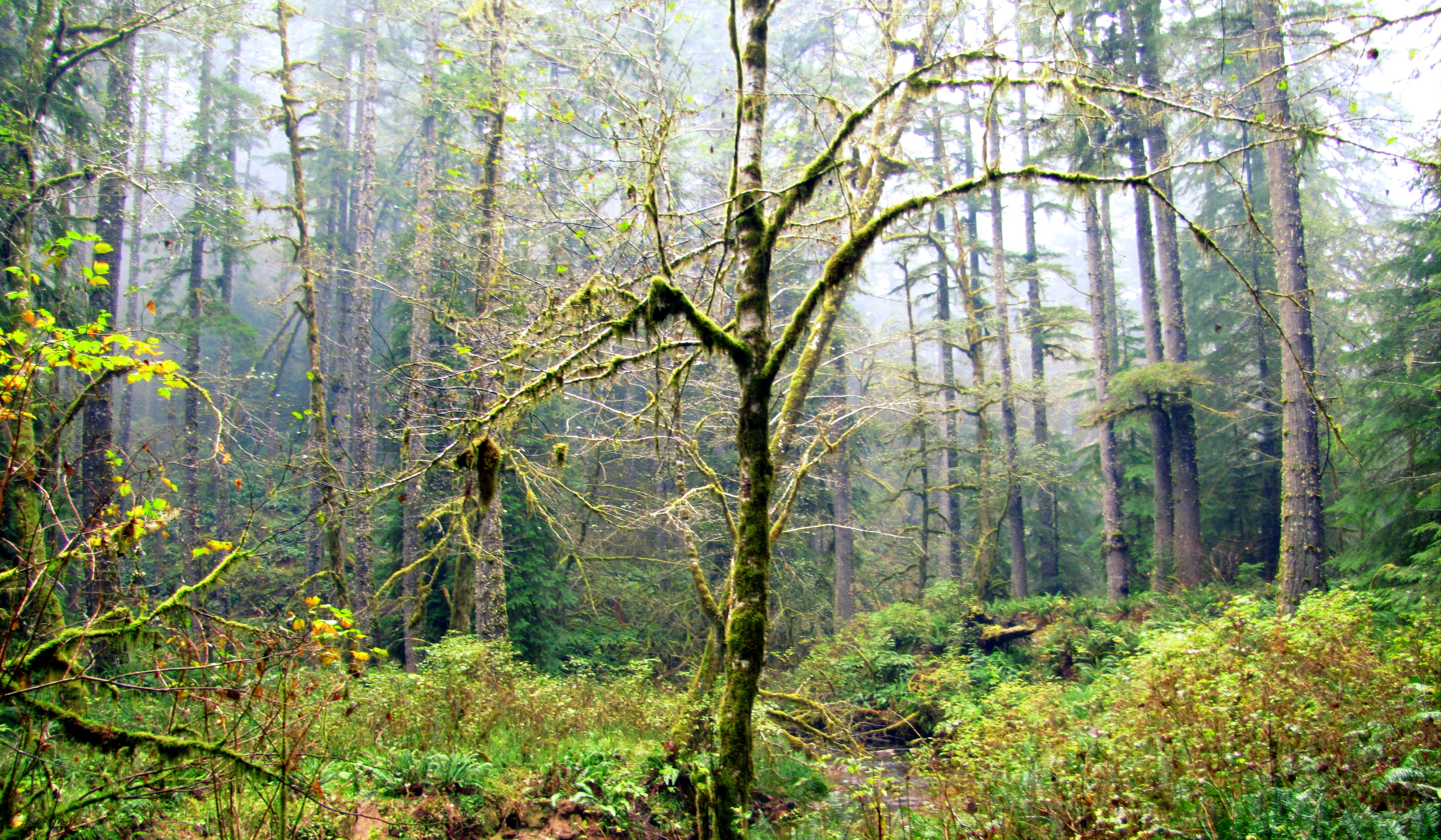 Elliott State Forest